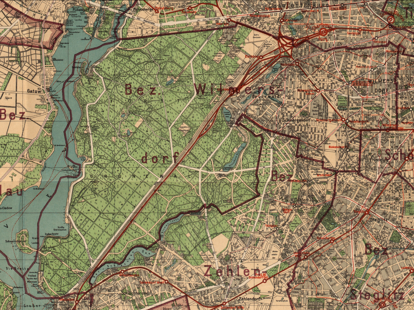 Ausschnitt aus Silva-Übersichtsplan von der Stadt Berlin und ihren 20 Verwaltungsbezirken : auf Grund des Gesetzes vom 27. April 1920 / bearb. und hrsg. von Willy Holz Format: ca 163 x 117 cm Orientierung: Nord Maßstab: 1: 30 000 (Innenstadt 1: 20 000) 2 Blätter, mehrfarbig